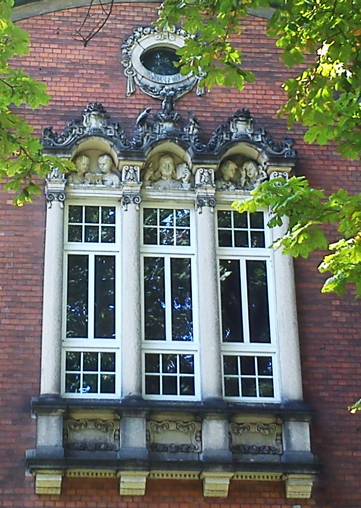 Poznań Łazarz - zespół zabudowań szkolnych, okno szkoły z płaskorzeźbą Dzieci grzeczne i niegrzeczne (zabytek nr A 258).